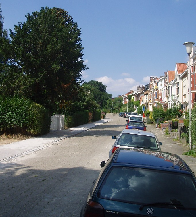 rue des Nefliers Auderghem et Watermael-Boitsfort Belgium